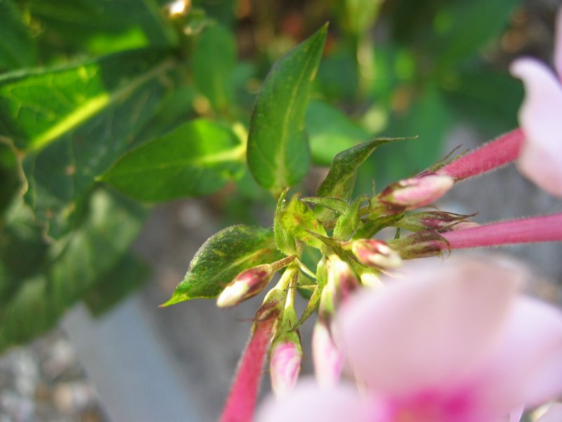 kreuzgegenständige untere Blätter von Phlox paniculata flav. Eva collum